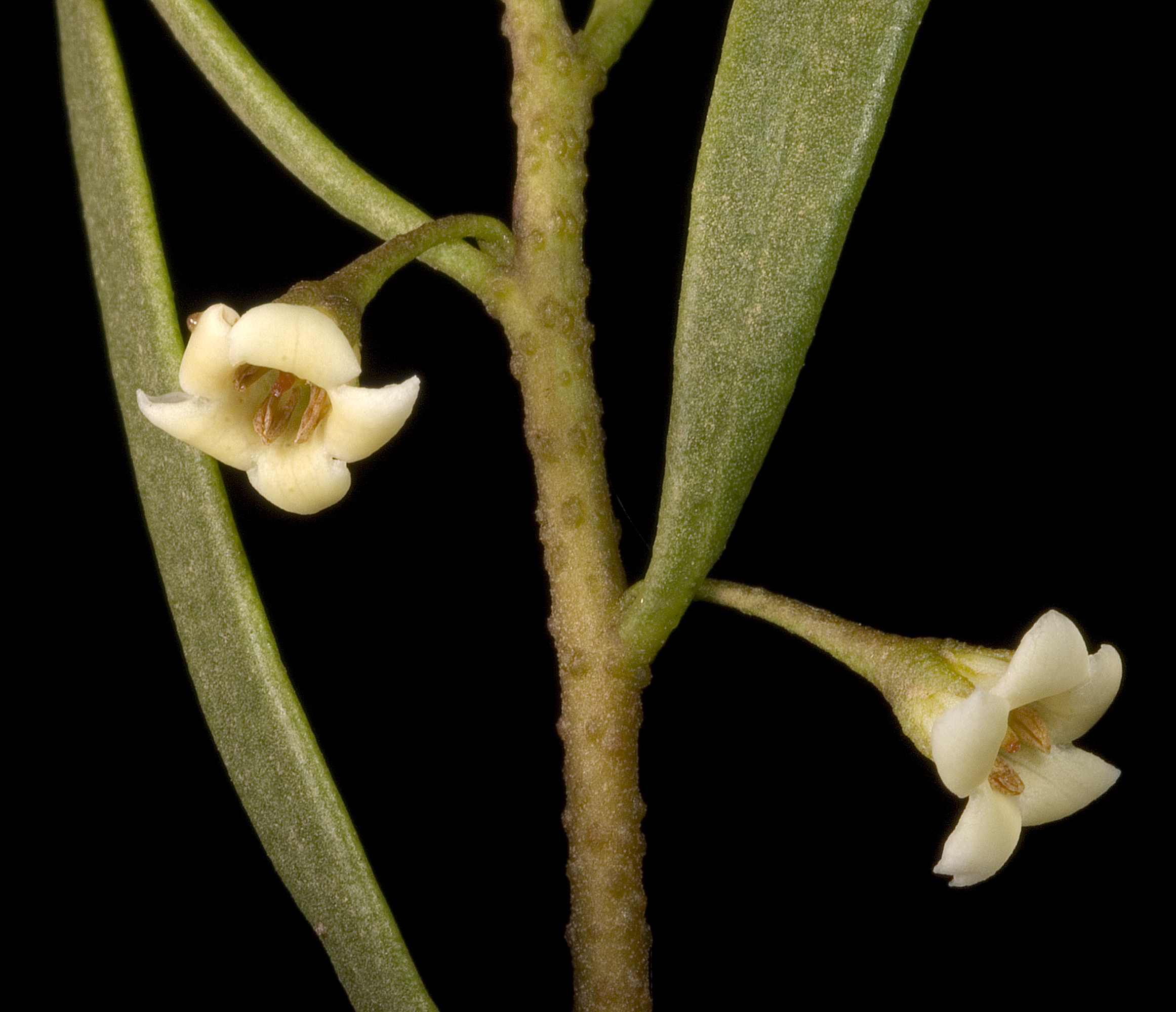 KRT3724